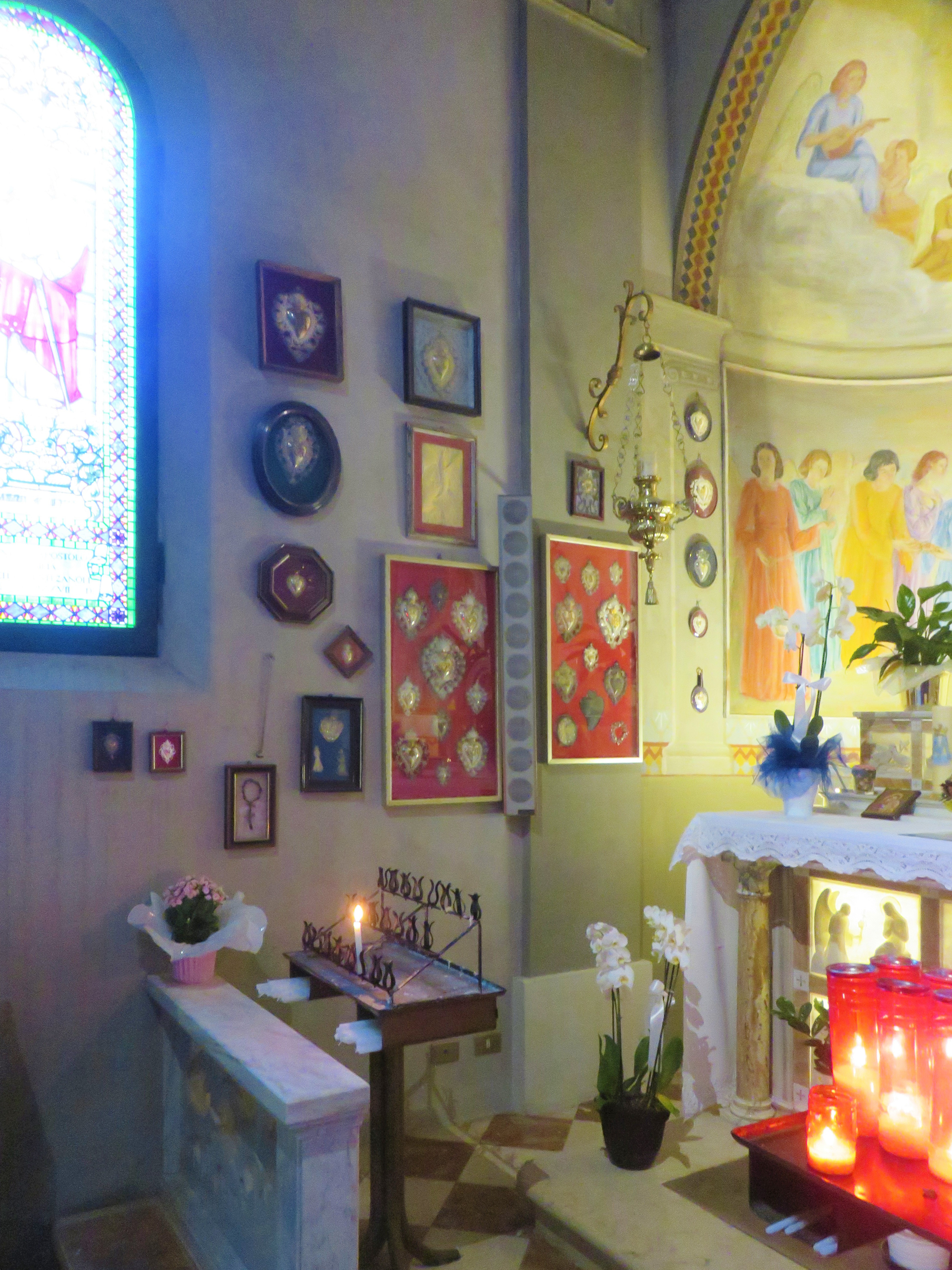 Chiesa dell'Invenzione della Santa Croce Carpi. Cappella-Santuario della Madonna dell'Aiuto. Ex voto.